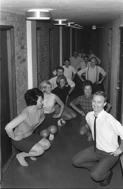 Her er det trim i arbeidstiden. Hydrologisk arkiv. Dato: 10.10.1968